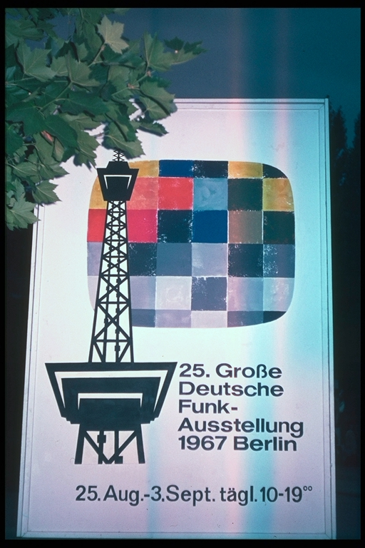 Werbeschild für die 25. Funkausstellung 1967 in Berlin (Einführung des Farbfernsehens). Im Vordergrund Berliner Funkturm.